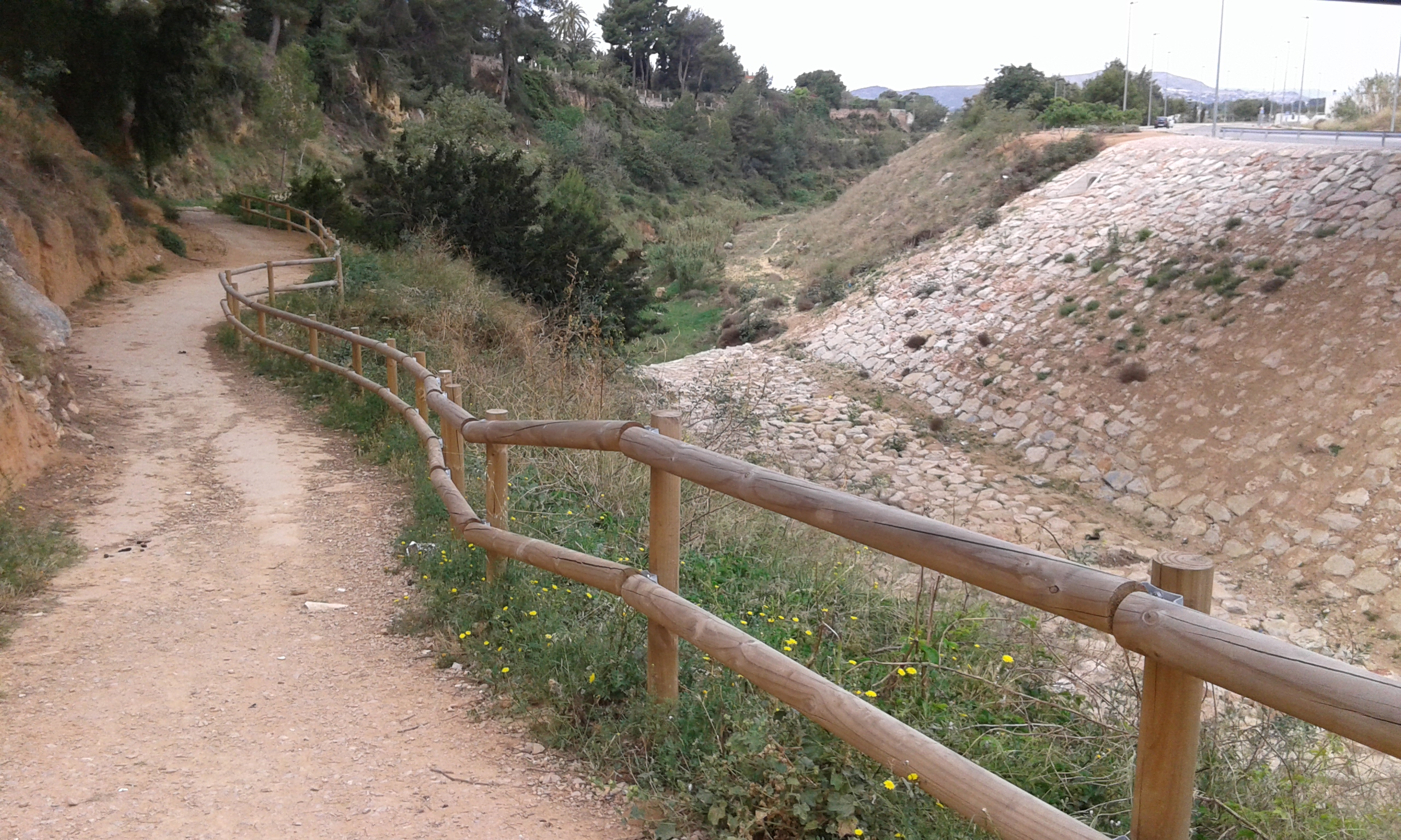 Diverses vistes i equipament del Reg mil·lenari del Barranc de l'Horteta de Torrent